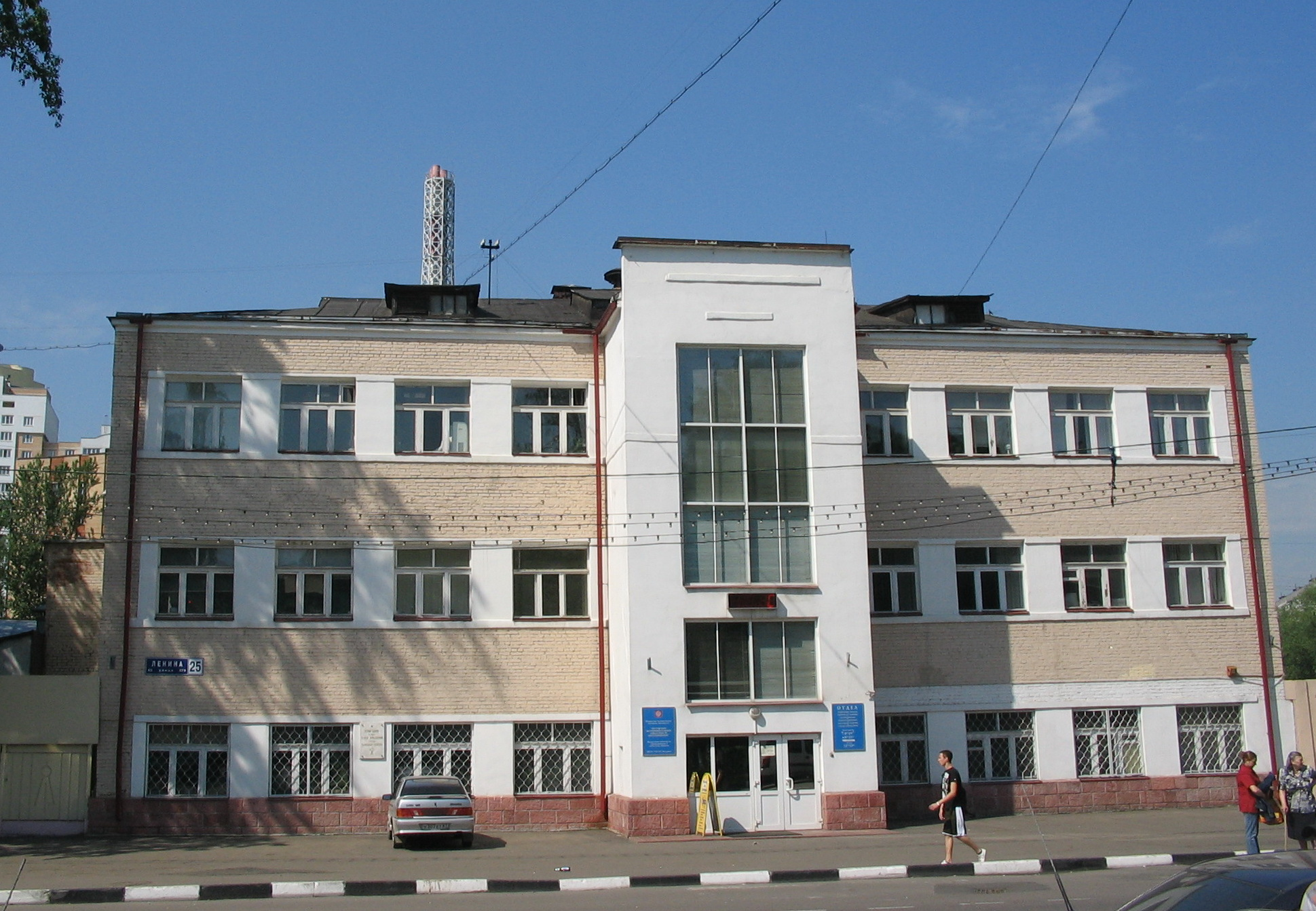 Реутовский экспериментальный завод средств протезирования.